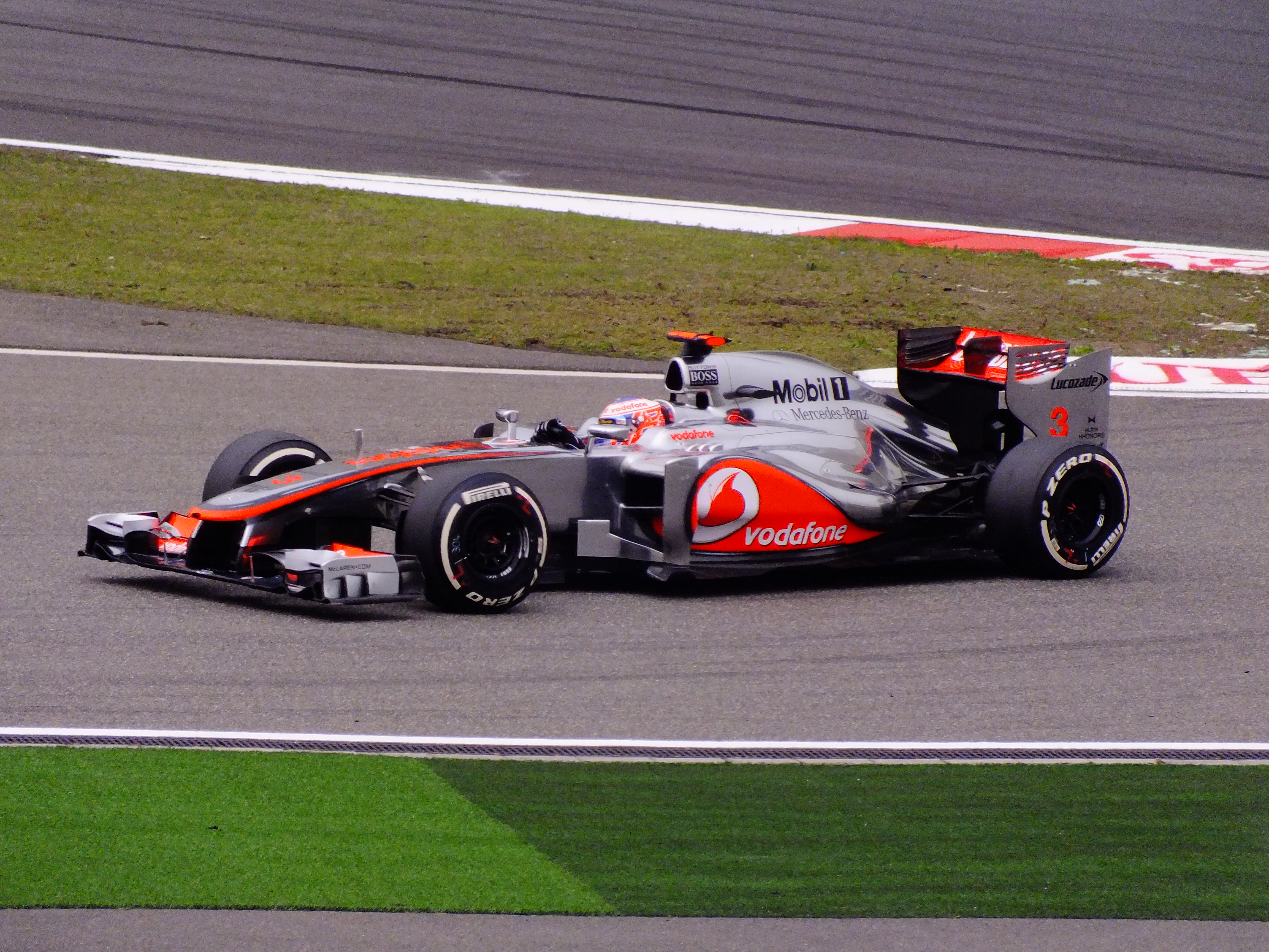 2012-4 上海国际赛车场（ F1 2012）